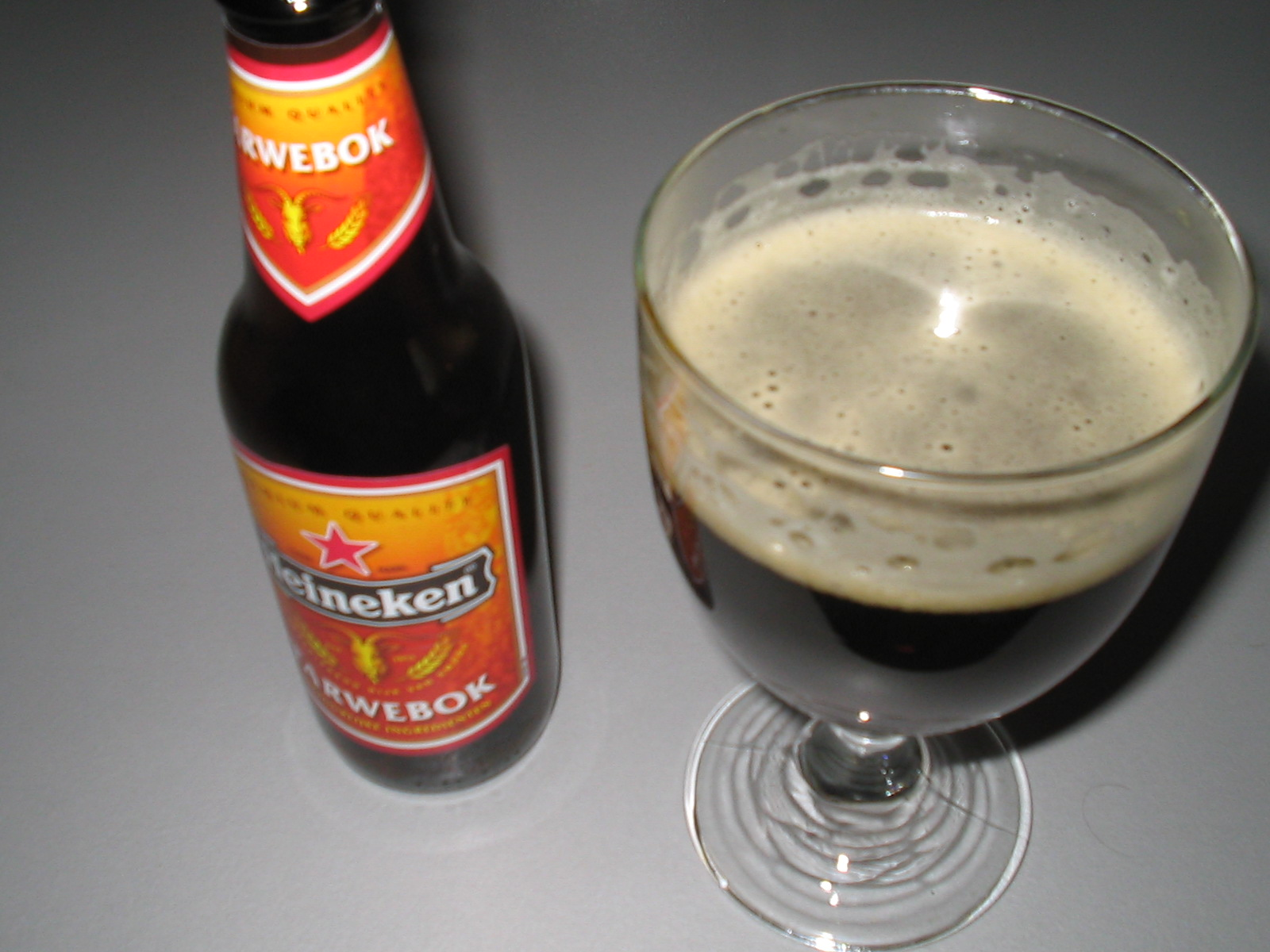 bokbier in flesje met een gevuld glas